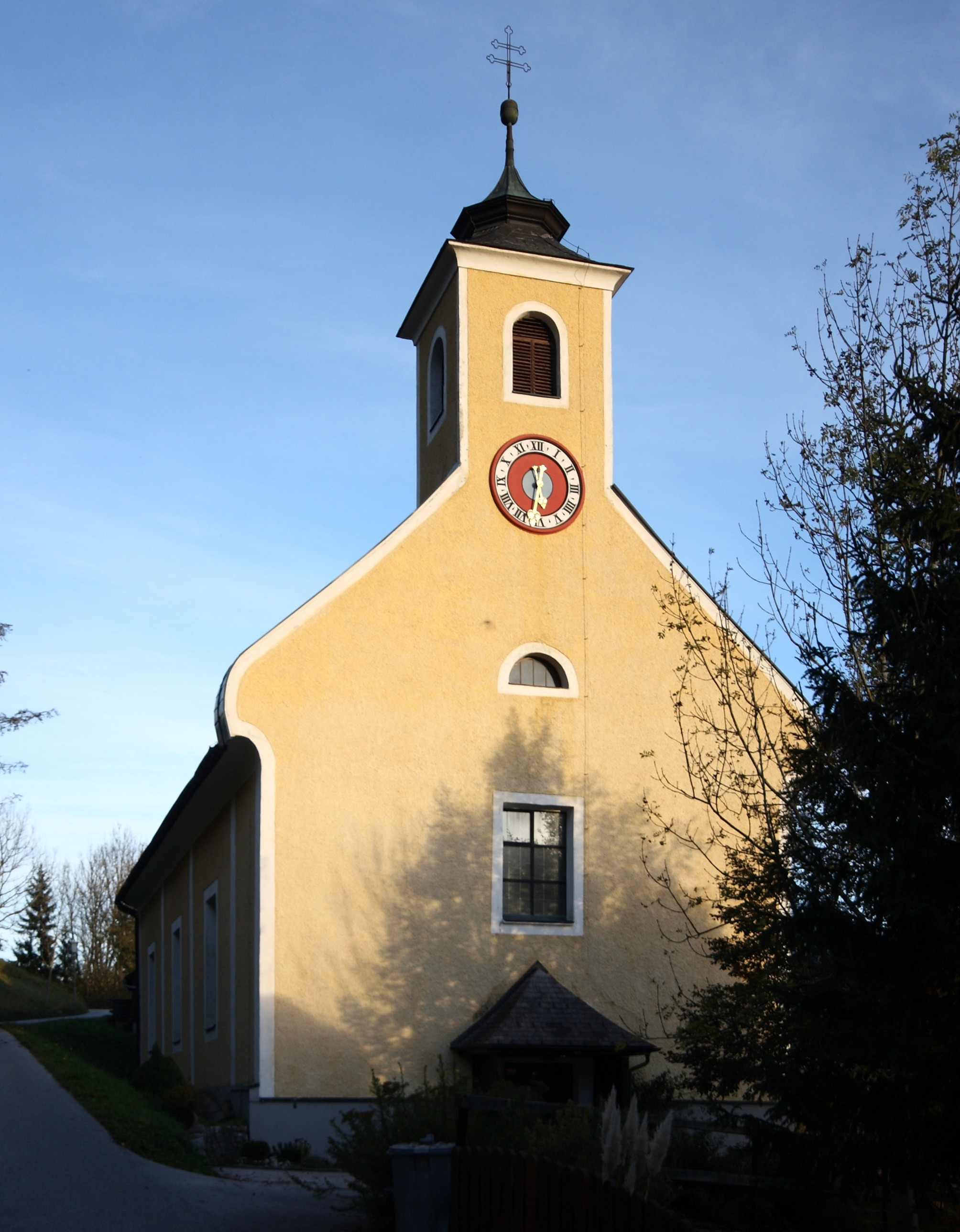 Kath. Pfarrkirche hl. Martin